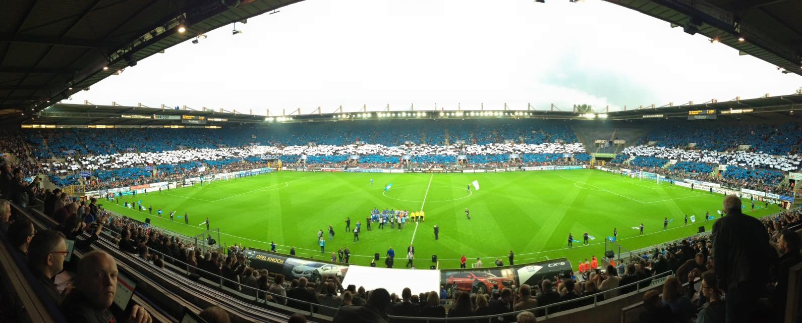 Tifo des UB 90 pour Strasbourg-Dunkerque pour la montée en Ligue 2, Stade de la Meinau, Strasbourg, France